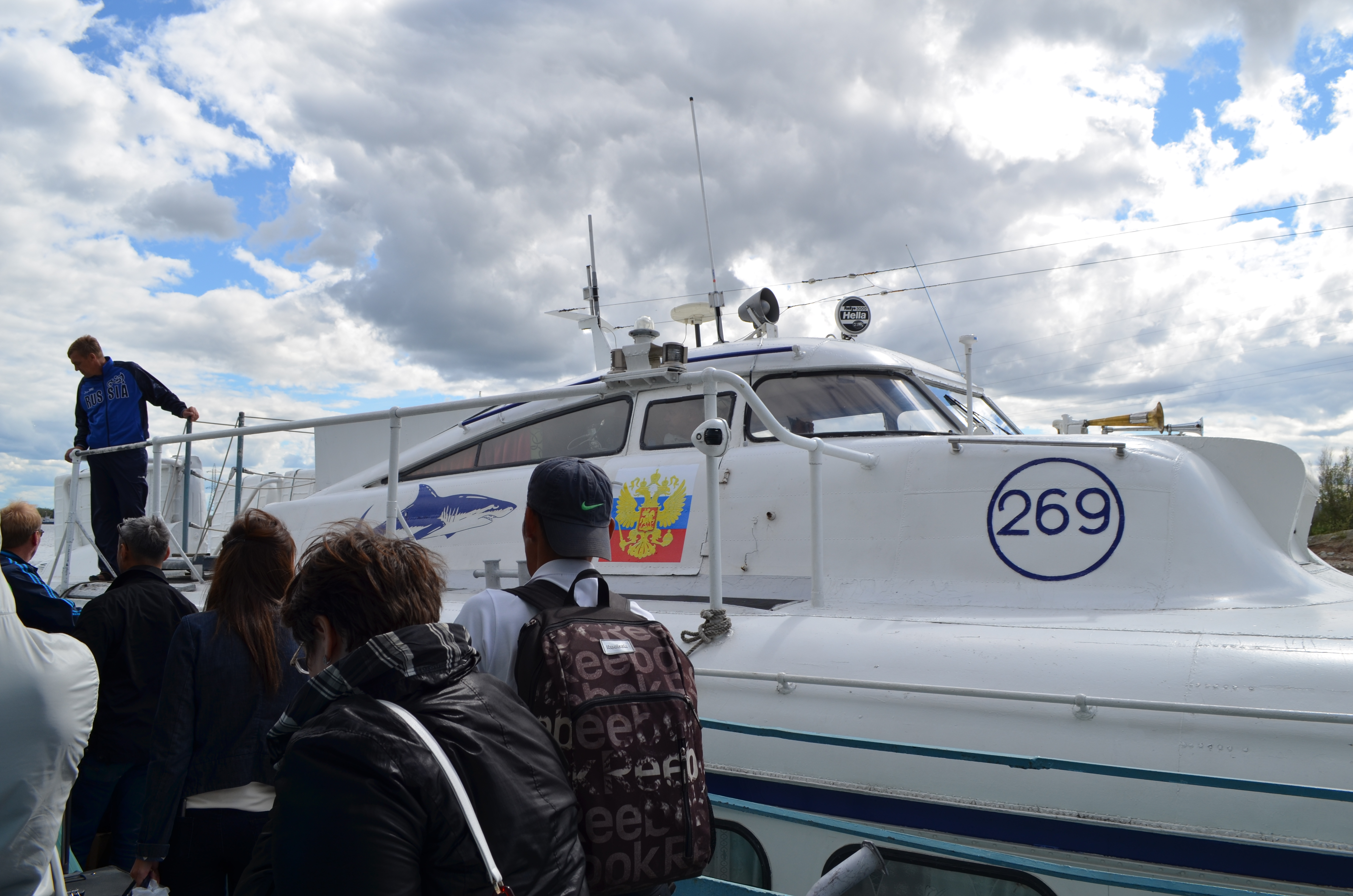 Поездка в Сангар 19-20.06.2016 на теплоходе Ракета-269